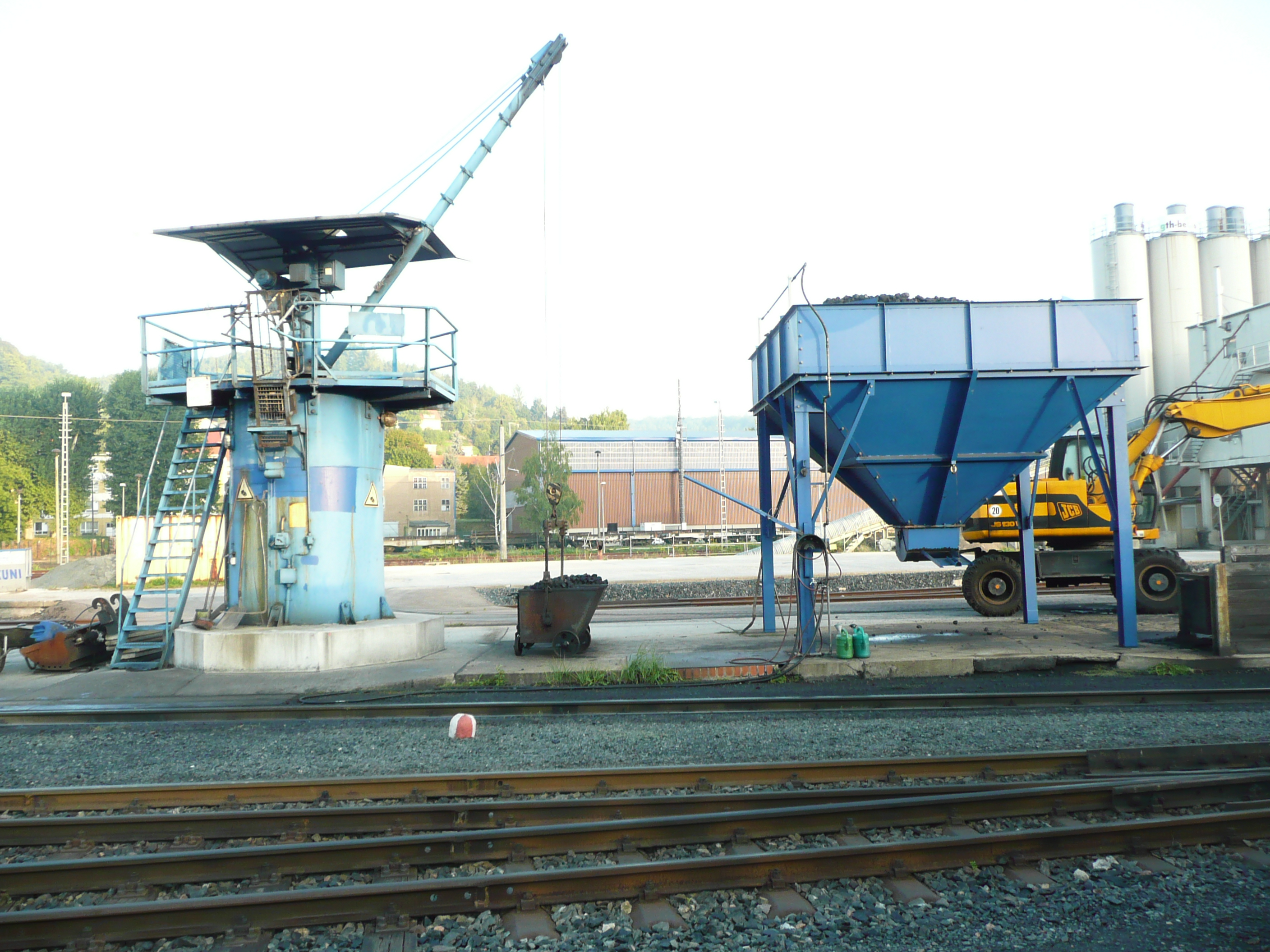 Bekohlungsanlage des Schmalspurteiles im Bahnhof Freital-Hainsberg